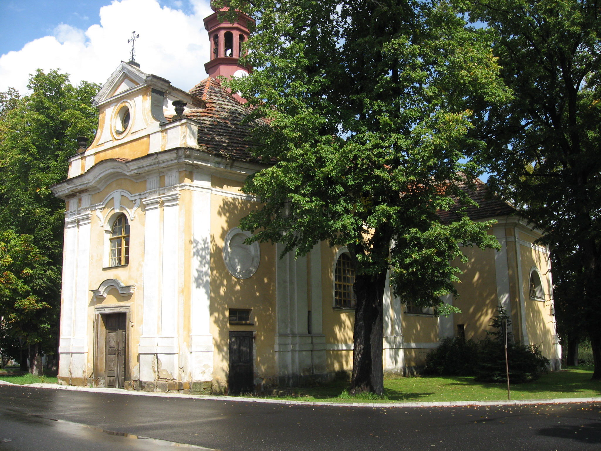 Kostel sv. Jiří, Panenský Týnec, okr. Louny